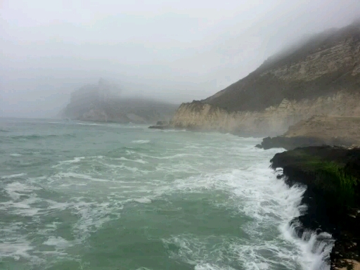 شاطئ المغسيل في محافظة ظفار (عمان)